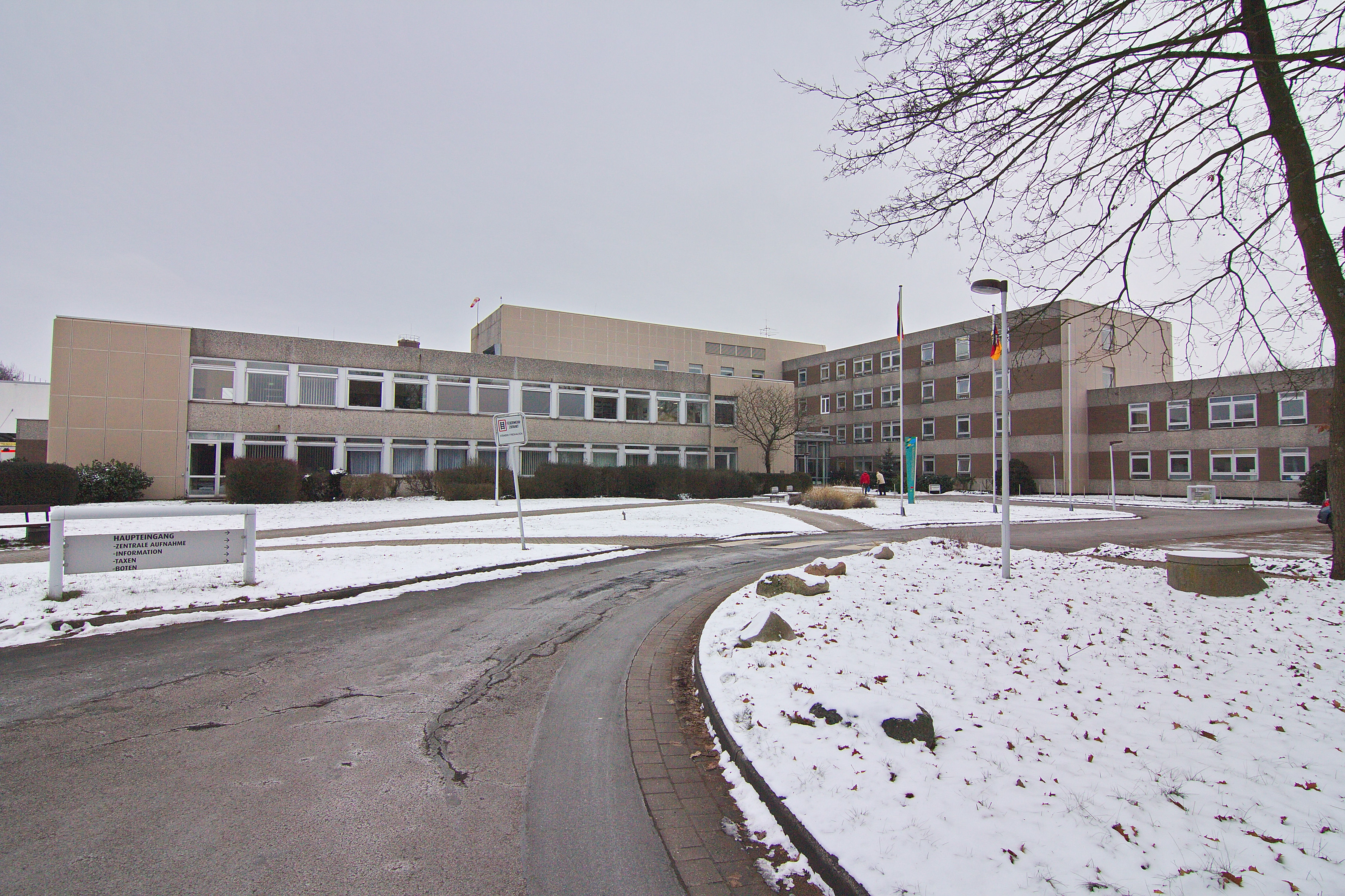 Klinikum Großburgwedel (Burgwedel), Niedersachsen, Deutschland